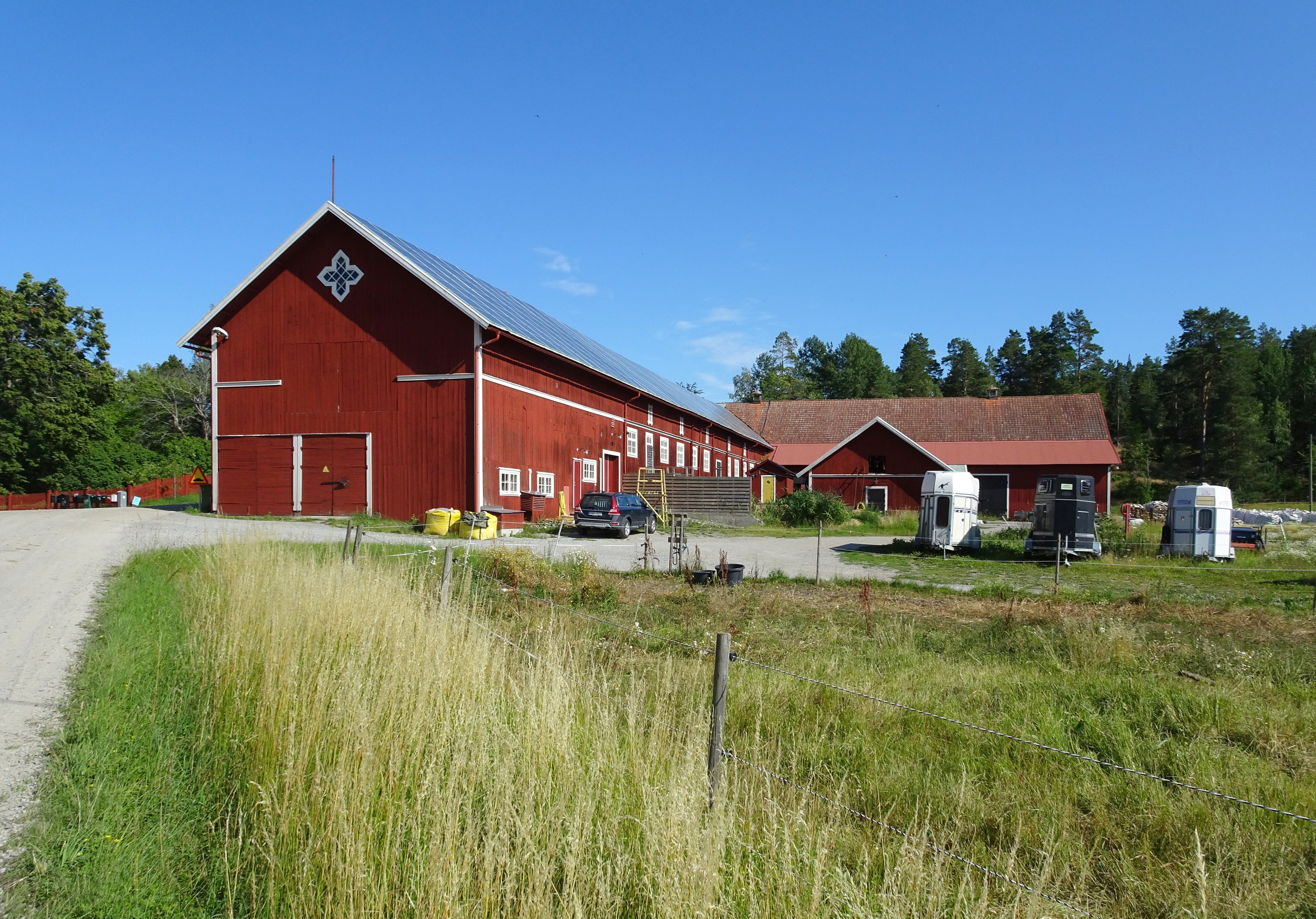 Hedlanda herrgård, huvudbyggnad